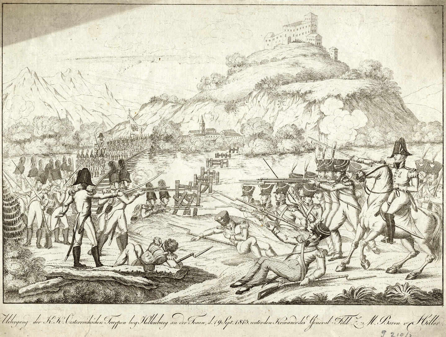 Übergang der Österreicher bei Hollenburg an der Drau 1813, Radierung, nach 1815